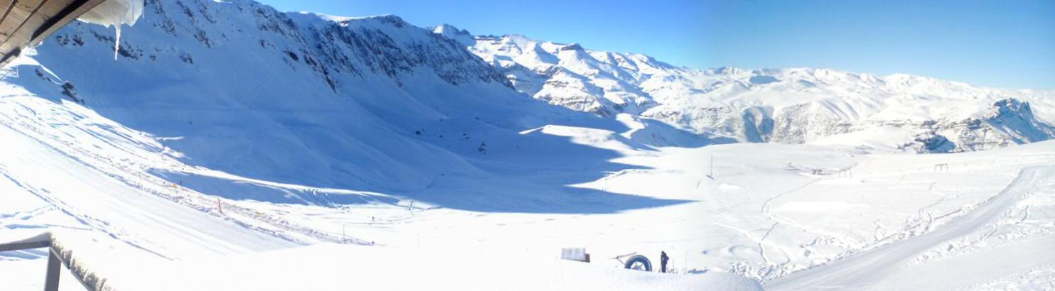 Imagen panorámica de una de las pistas del centro de ski Farellones, en Santiago de Chile